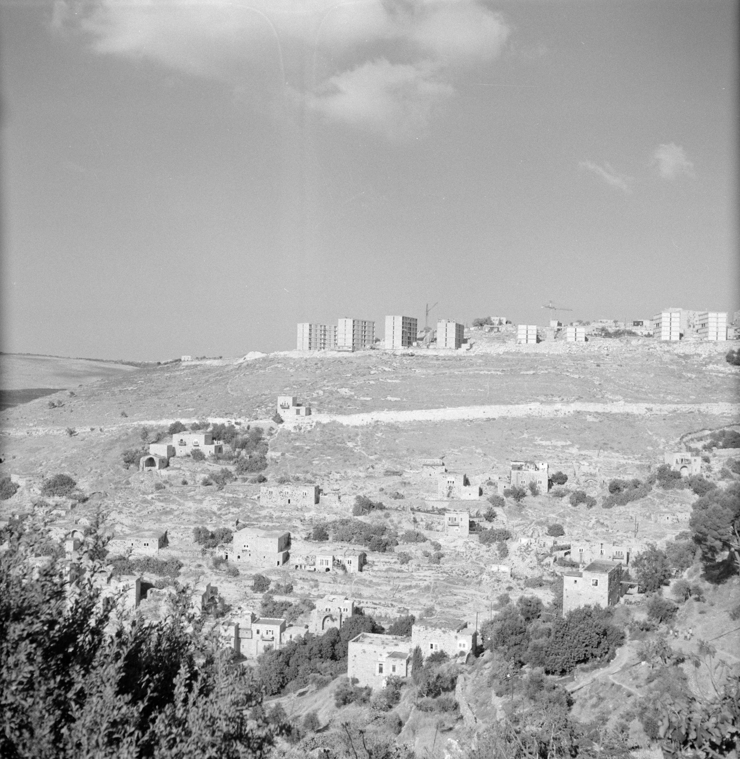 Collectie / Archief : Fotocollectie Van de Poll Reportage / Serie : Israël 1964-1965: Jerusalem (Jeruzalem), onderweg Beschrijving : Nieuwbouw in aanbouw langs de weg Datum : 1964 Locatie : Israël, Jeruzalem Trefwoorden : flatgebouwen, hijskranen Fotograaf : Poll, Willem van de, [onbekend] Auteursrechthebbende : Nationaal Archief Materiaalsoort : Negatief (zwart/wit) Nummer archiefinventaris : bekijk toegang 2.24.14.02 Bestanddeelnummer : 255-2231